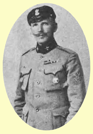 płk Czesław Rybiński (1872 - 1928)